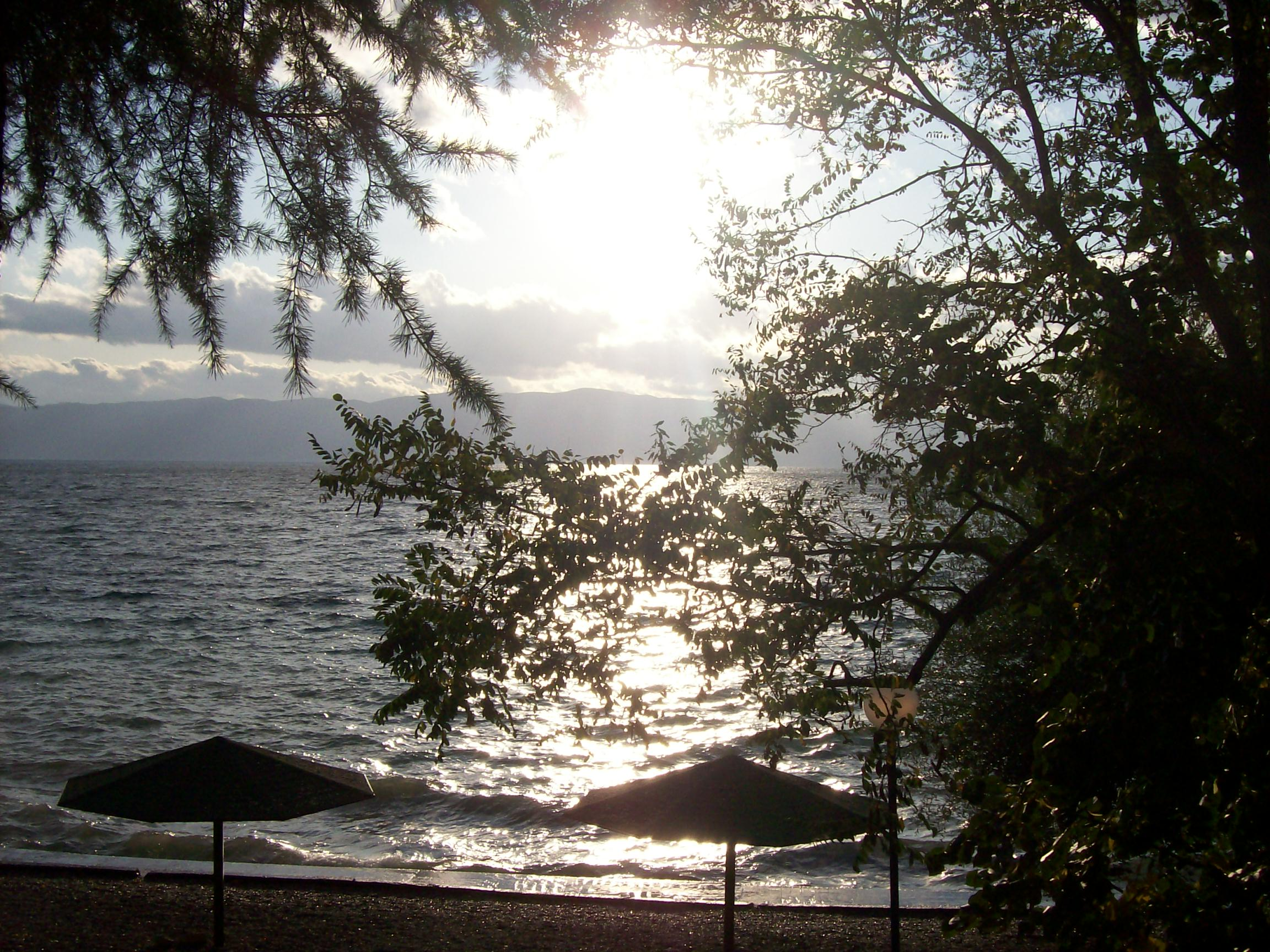 додека престојував во Охрид, во охктомври кога времето беше малку постудено успејав да направам перфектна фотогра